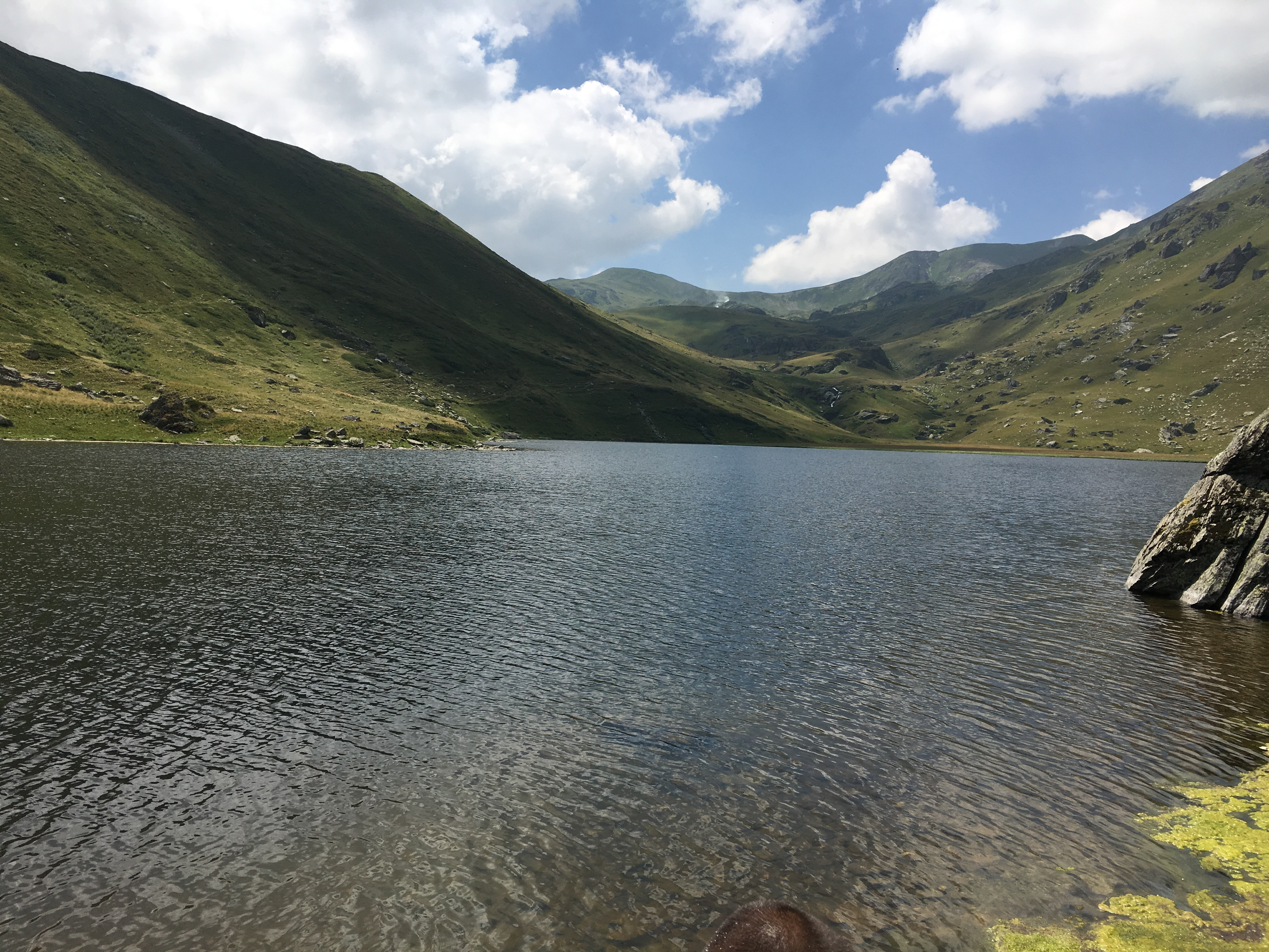 Municipality of Bogovinje, Macedonia (FYROM) Bogovina Lake